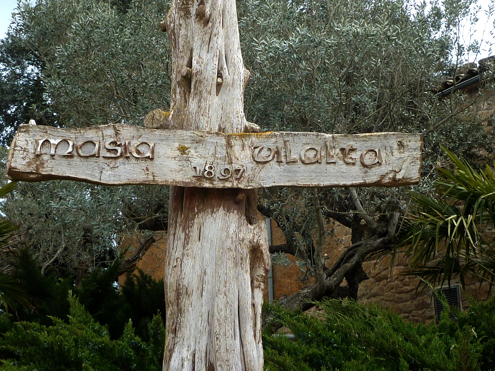 Masia Vilalta de Florejacs (Torrefeta i Florejacs): pal indicadorll